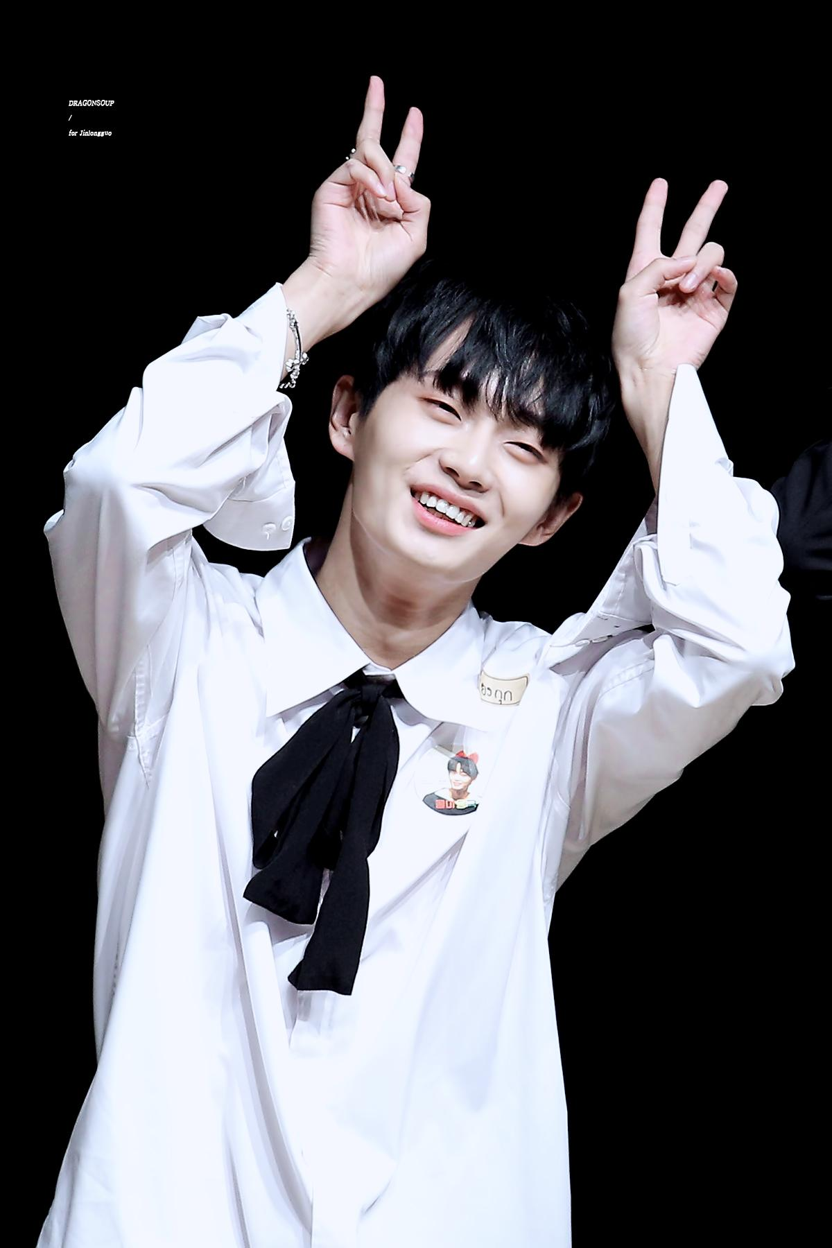 171022 일지아트홀 팬싸인회